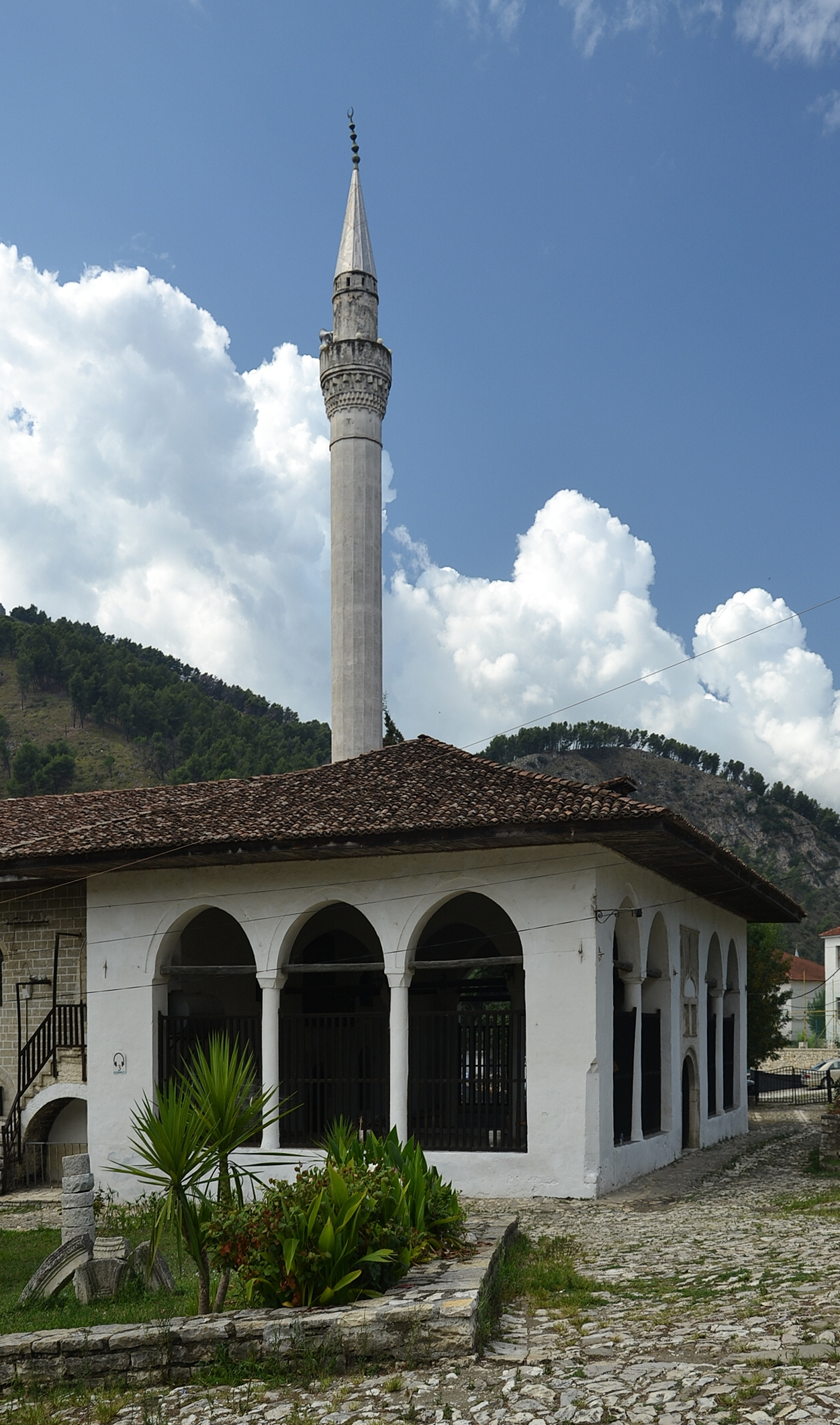 Xhamia Mbret